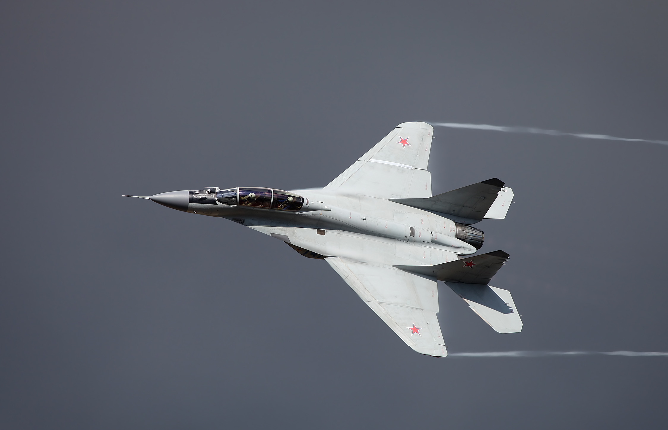 МиГ-29М2 (MiG-29M2)